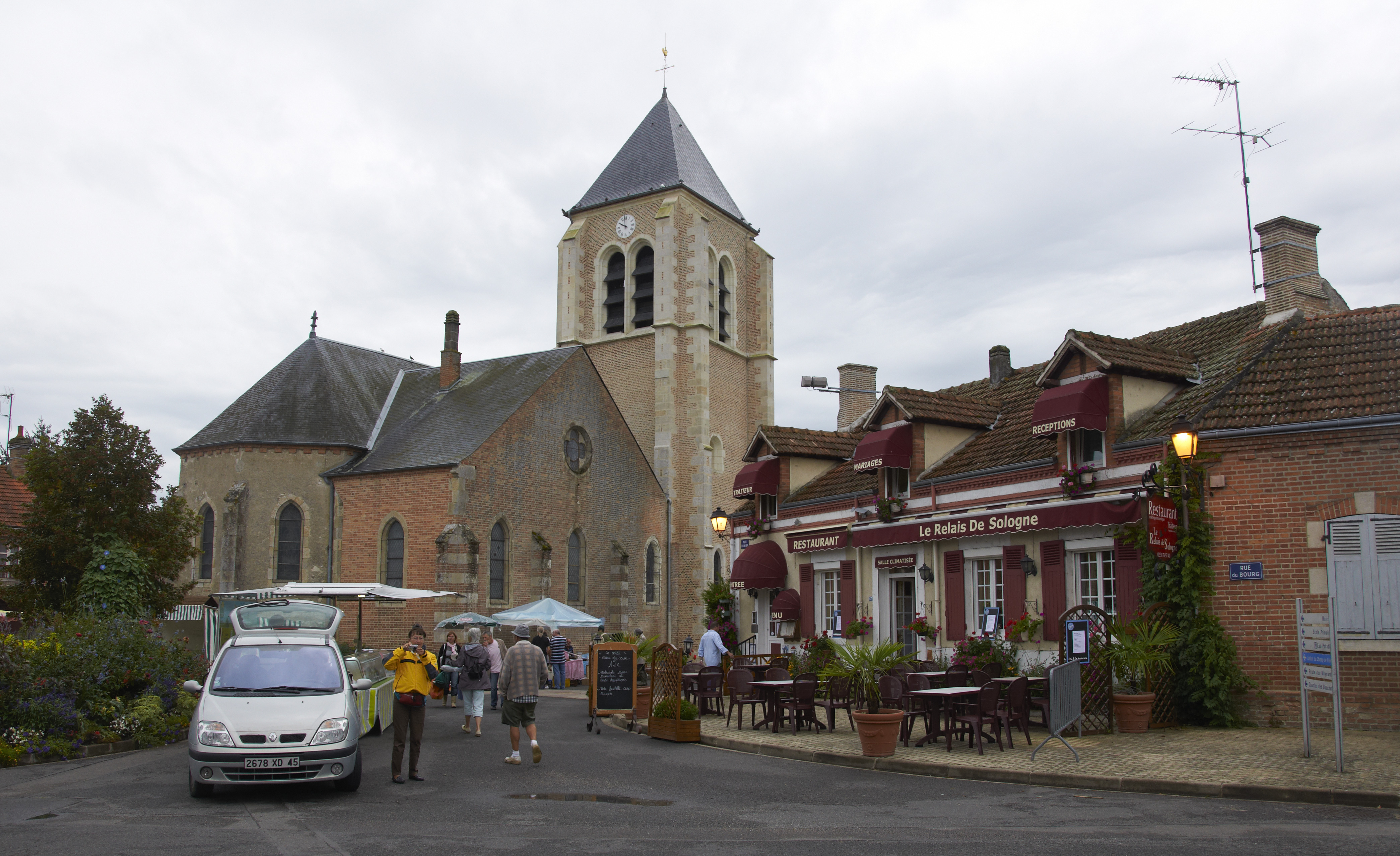 Vide grenier et l'église à Ménestreau-en-Villette, France